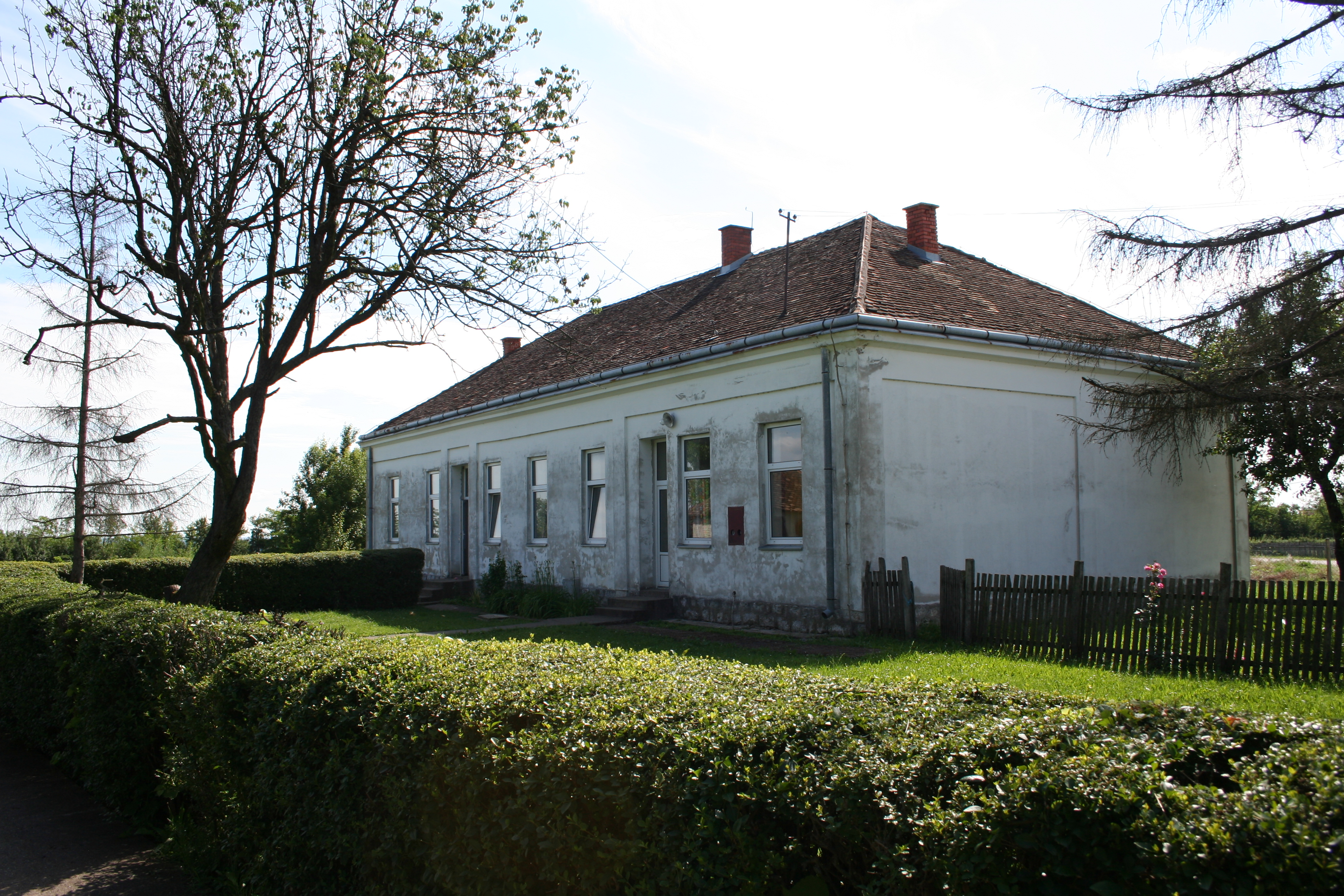 Zgrada škole, Mesarci opština Vladimirci